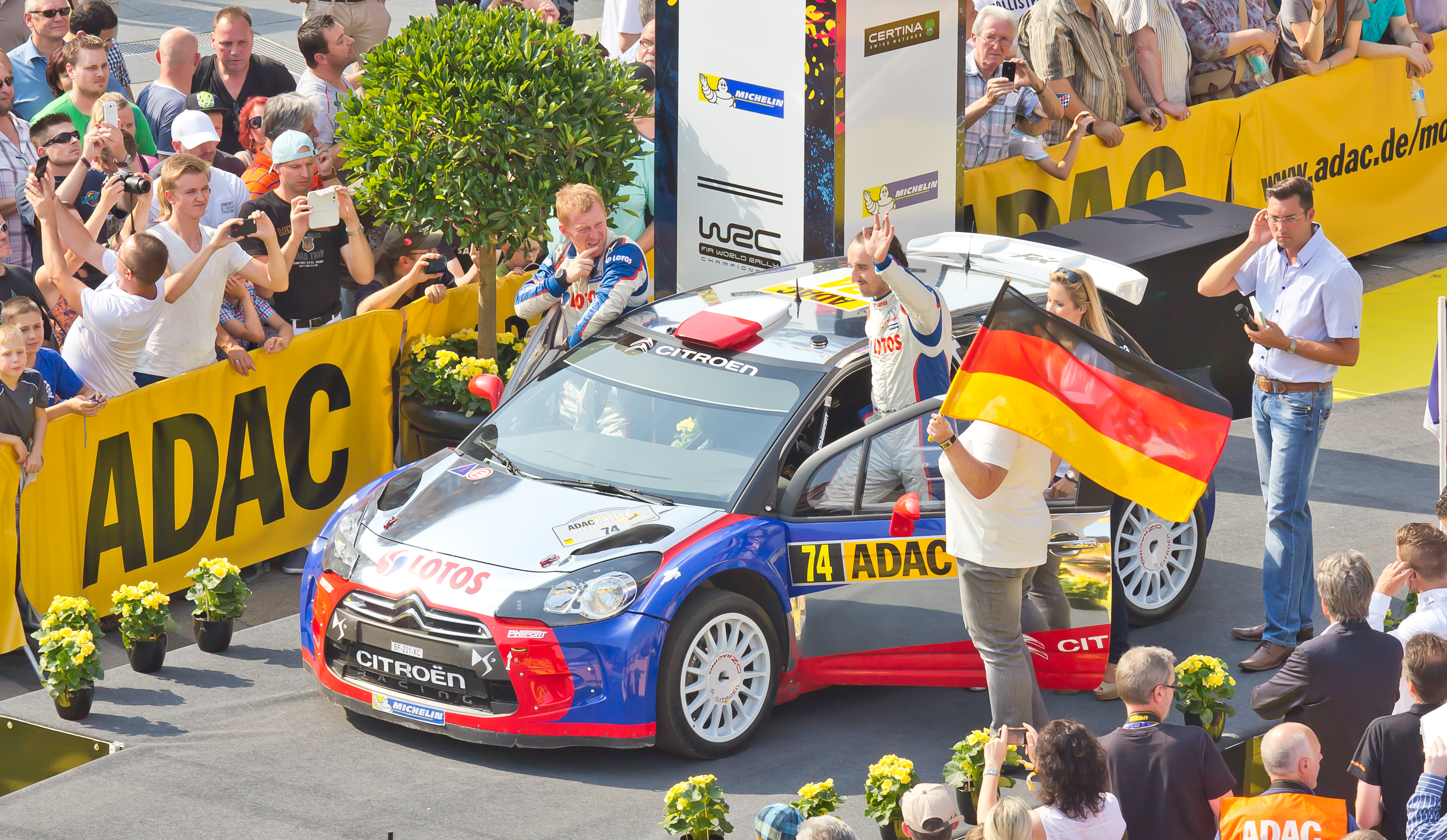 ADAC Rallye Deutschland 2013 - Fahrerpräsentation auf dem Roncalliplatz: Lotos Team WRC mit dem Fahrer Robert Kubica und Co-Fahrer Maciek Baran im Citroen DS3 RRC